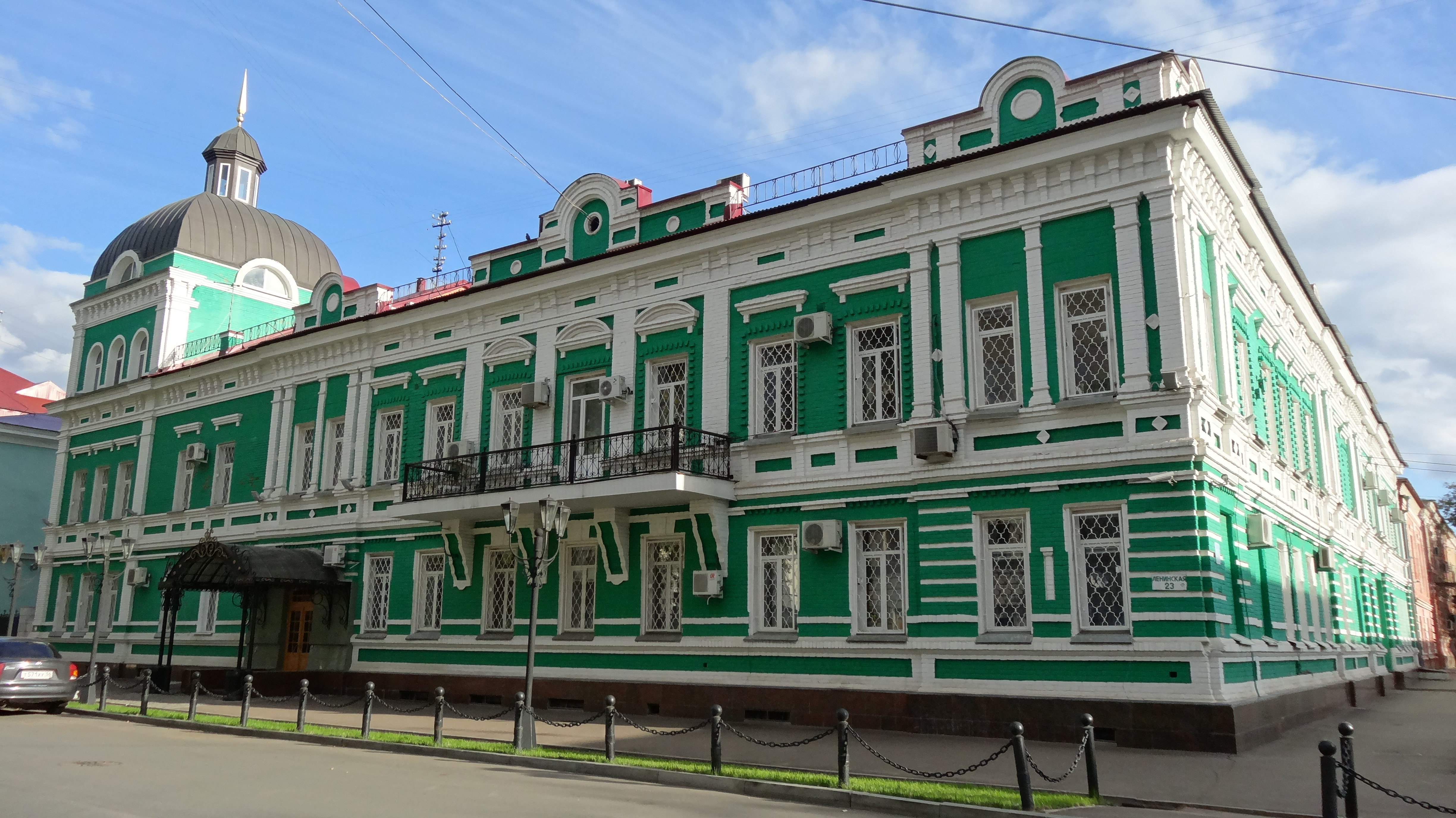 Банк Волжско-Камский (Оренбургская область, Оренбург, Ленинская улица, 23, Кобозева улица, 24)